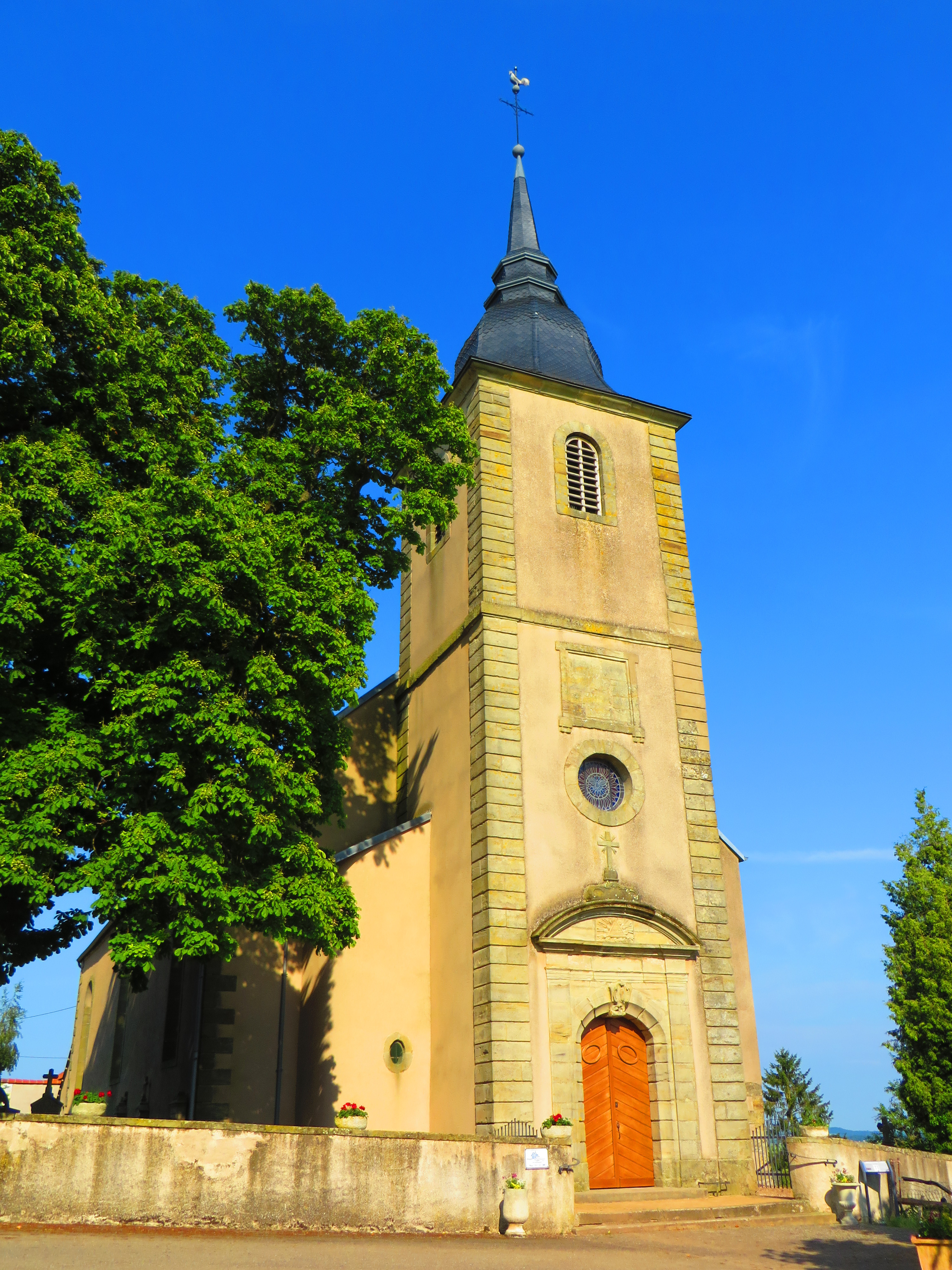 Berig Vintrange eglise